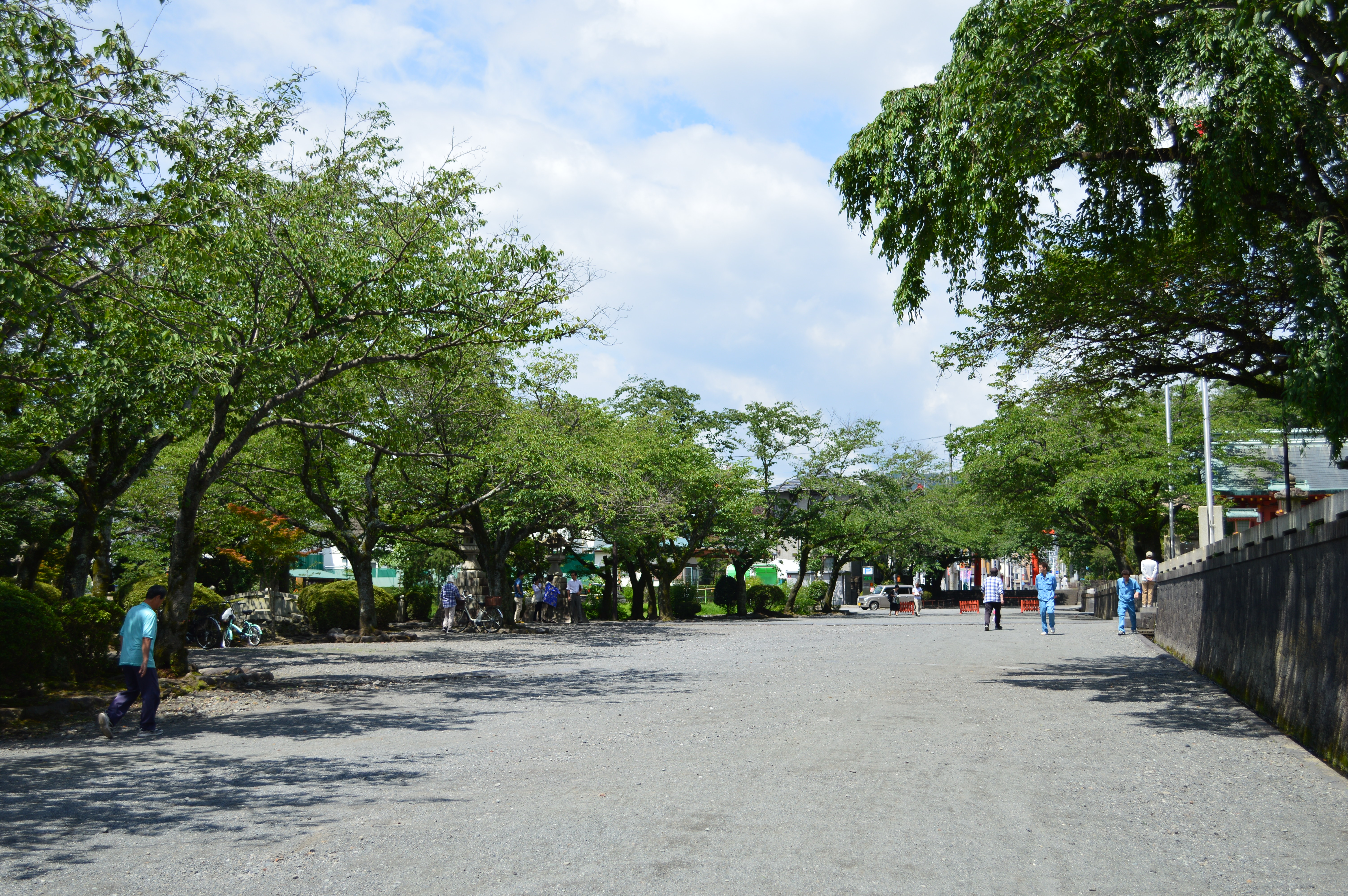 富士山本宮浅間大社 馬場